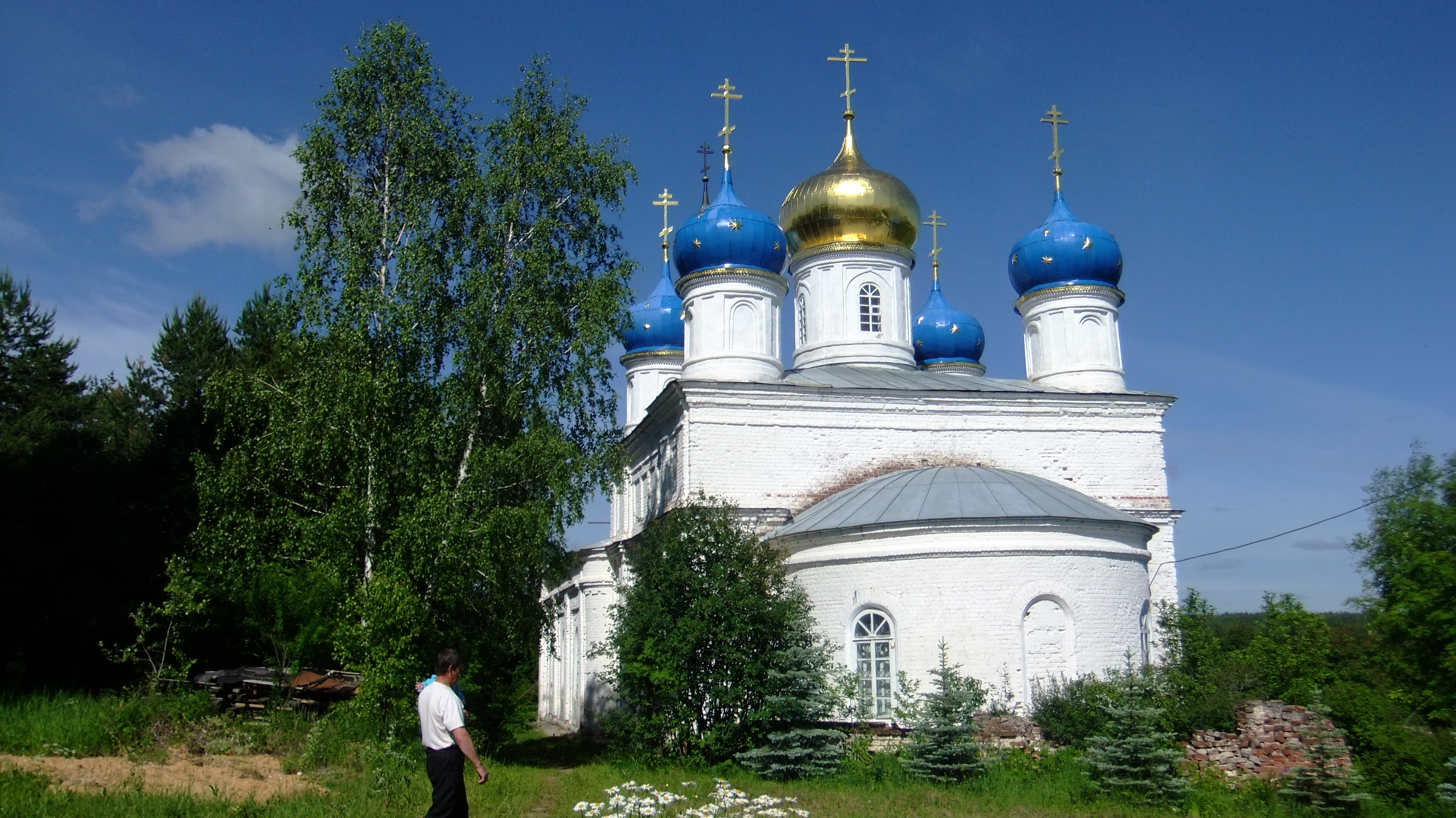 Церковь Владимирской иконы Божией Матери (Владимирская область, Муром, село Тучково)